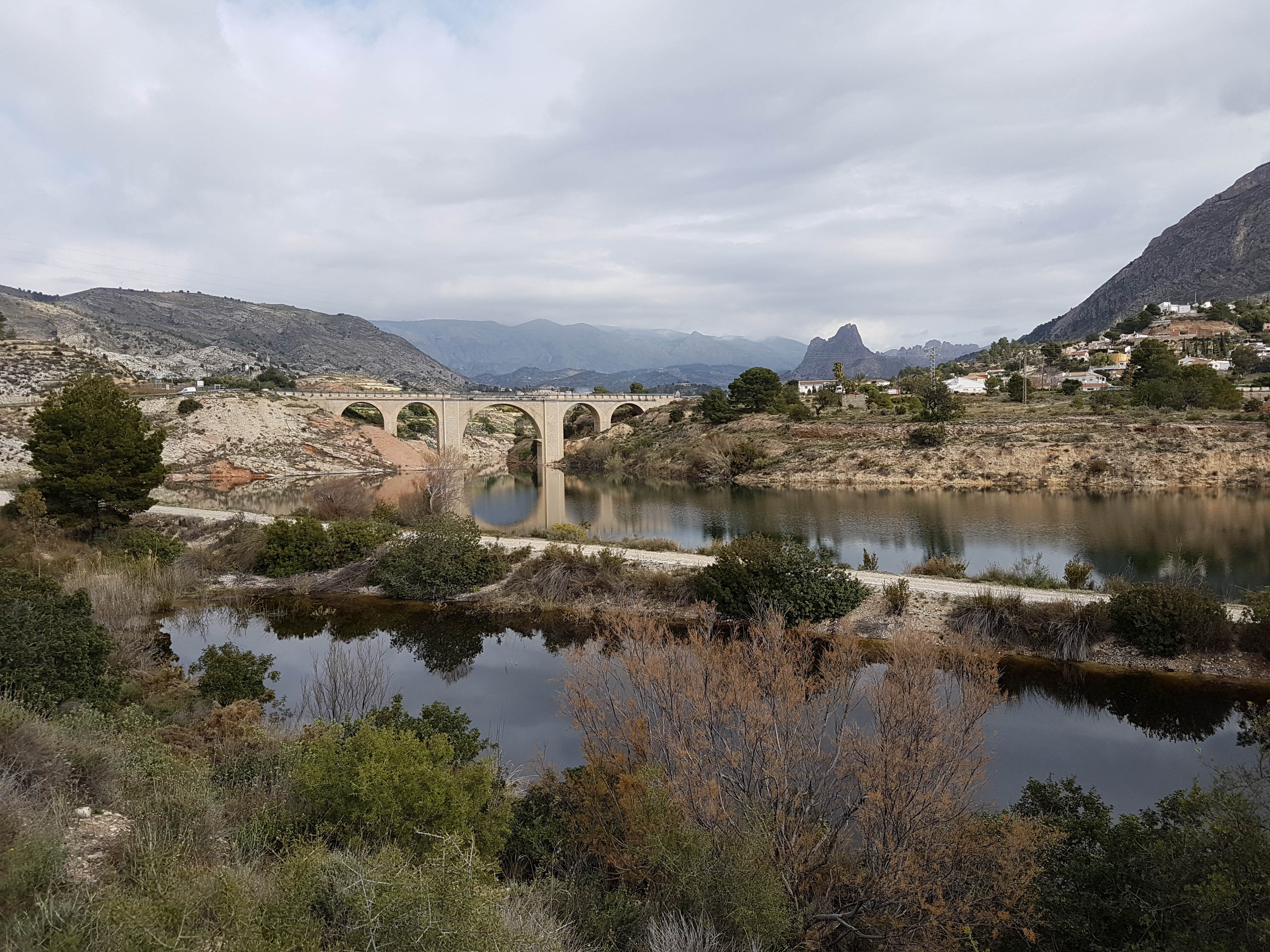 Rio Amadorio en Relleu